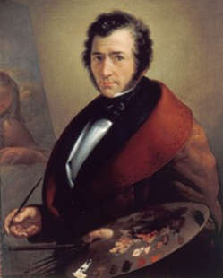 Odorico Politi - Autoritratto - Musei civici di Udine